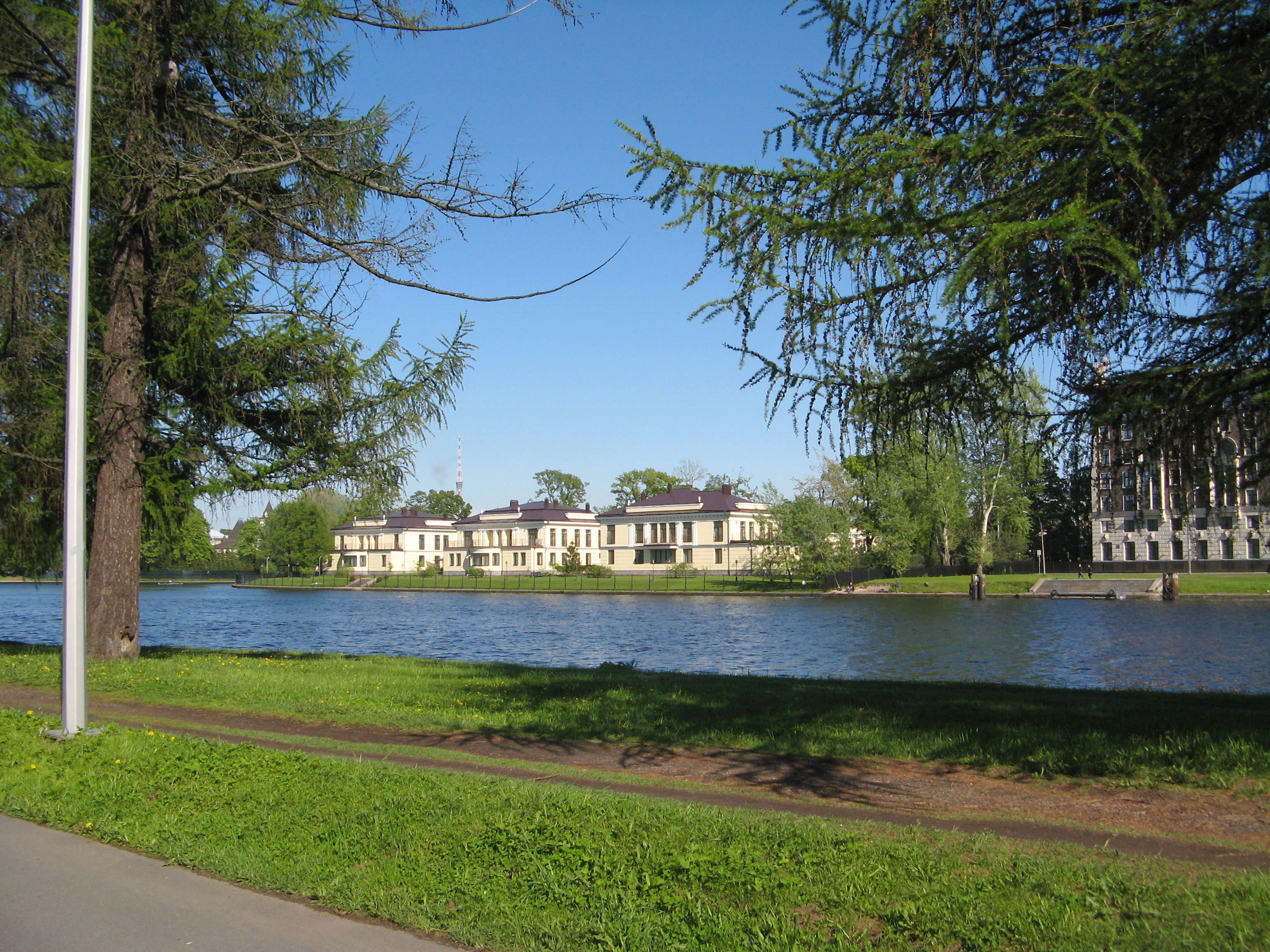 Елагин остров, Петроградский район This image is related to the protected area of Russia number 7810011